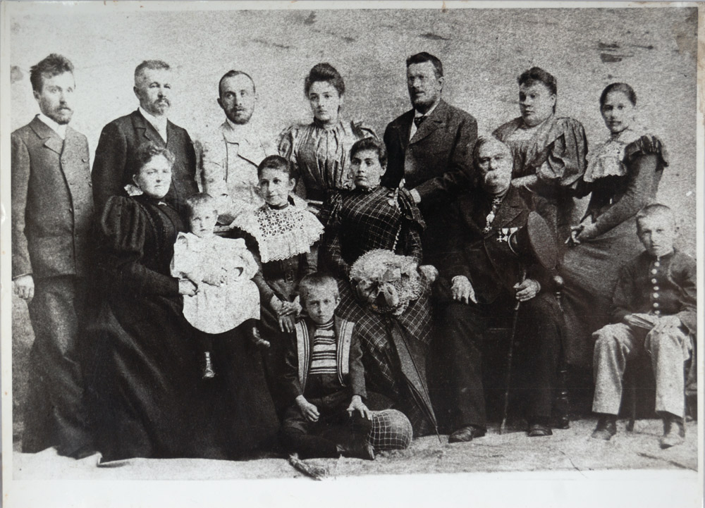 Родина Яновських. Кінець XIX ст.